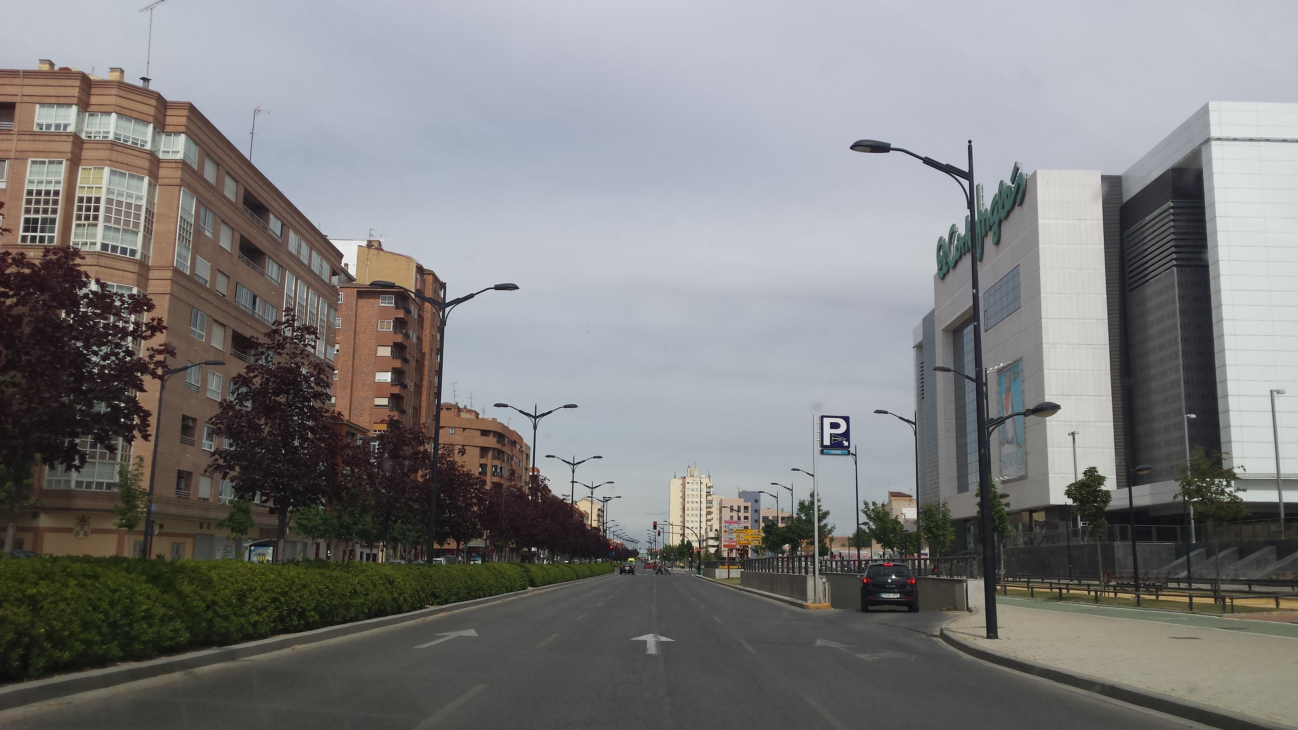 Circunvalación de Albacete. El Corte Inglés. Albacete